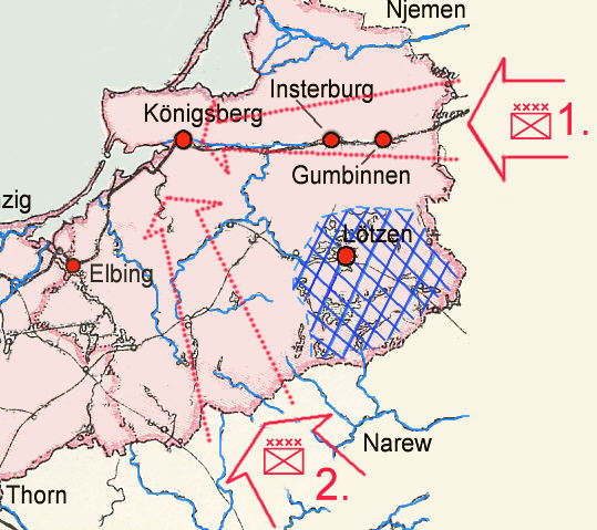 Den russiske plan for angrebet ind i Østprøjsen august 1914.